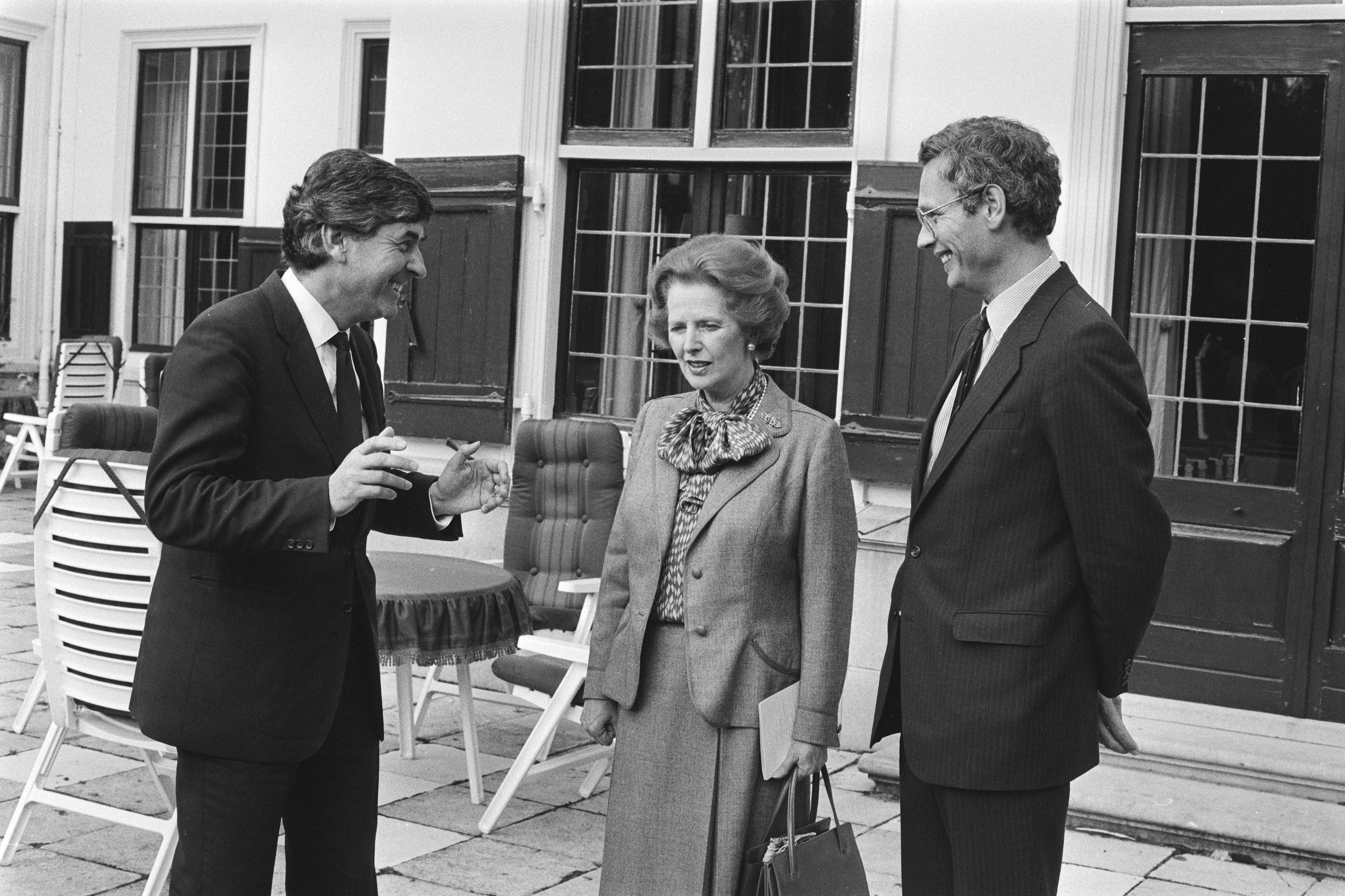 Collectie / Archief : Fotocollectie Anefo Reportage / Serie : Bezoek Engelse premier Margaret Thatcher Beschrijving : V.l.n.r. Premier Lubbers, premier Thatcher en minister Van den Broek (Buitenlandse Zaken) op het Catshuis Datum : 19 september 1983 Locatie : Den Haag, Zuid-Holland Trefwoorden : ministers, ministers-presidenten Persoonsnaam : Broek, Hans van den, Lubbers, Ruud, Thatcher, Margaret Fotograaf : Bogaerts, Rob / Anefo Auteursrechthebbende : Nationaal Archief Materiaalsoort : Negatief (zwart/wit) Nummer archiefinventaris : bekijk toegang 2.24.01.05 Bestanddeelnummer : 932-7038